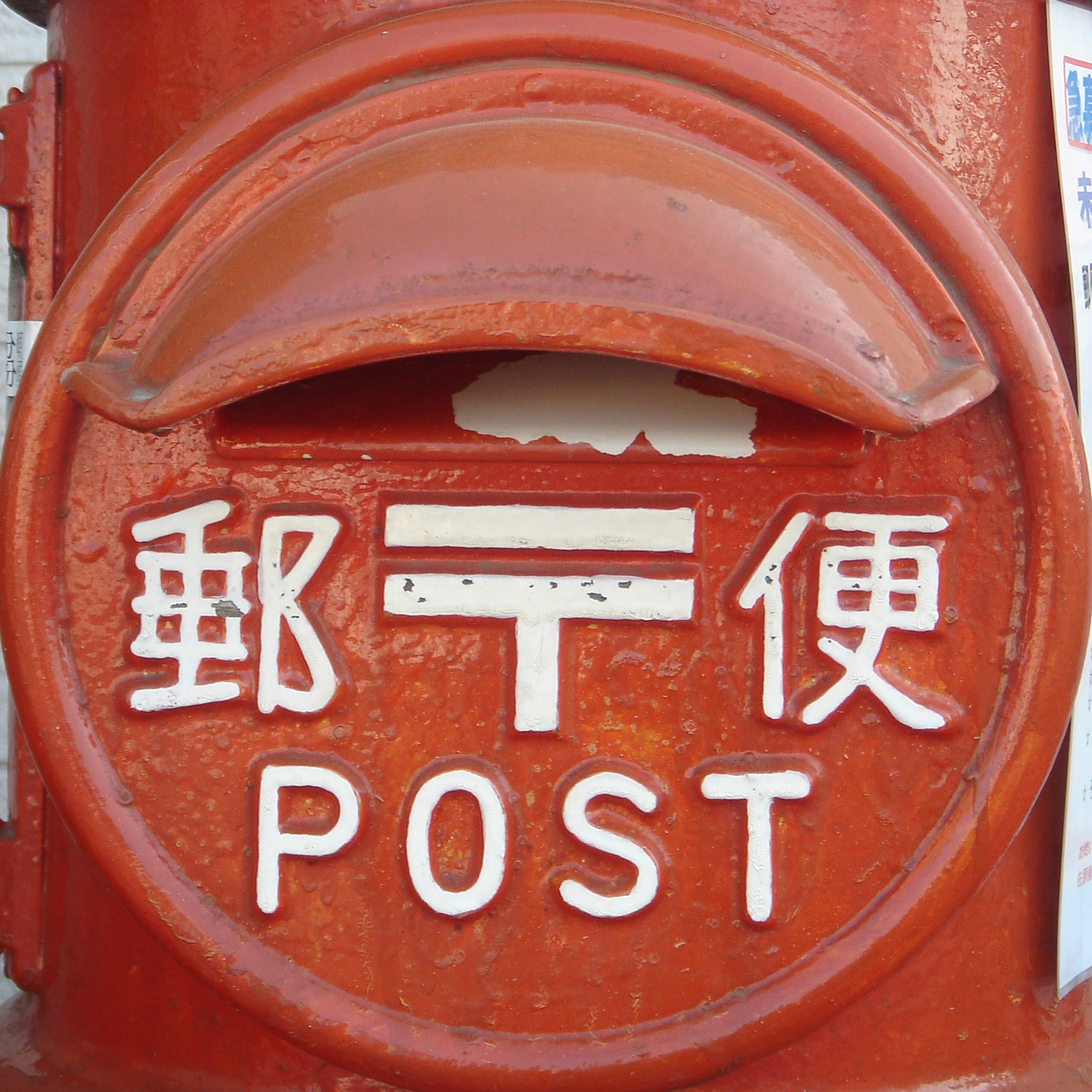 Red post box in Sawara, Chiba-ken, Japan